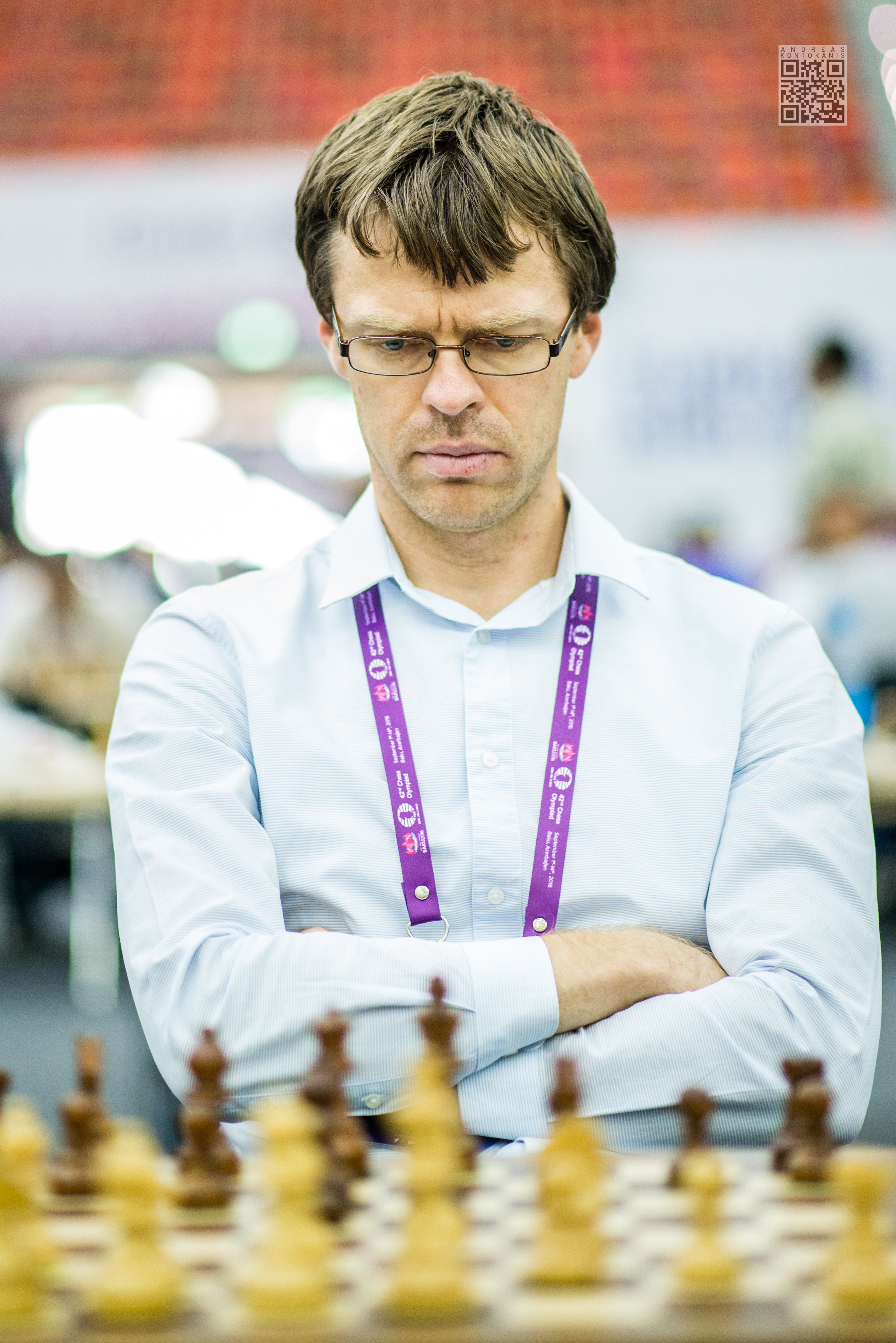 Sulskis Sarunas